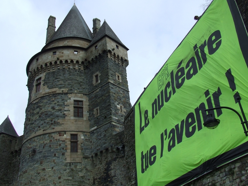 Déploiement de la banderole "le nucléaire tue l'avenir" sur le château de Vitré